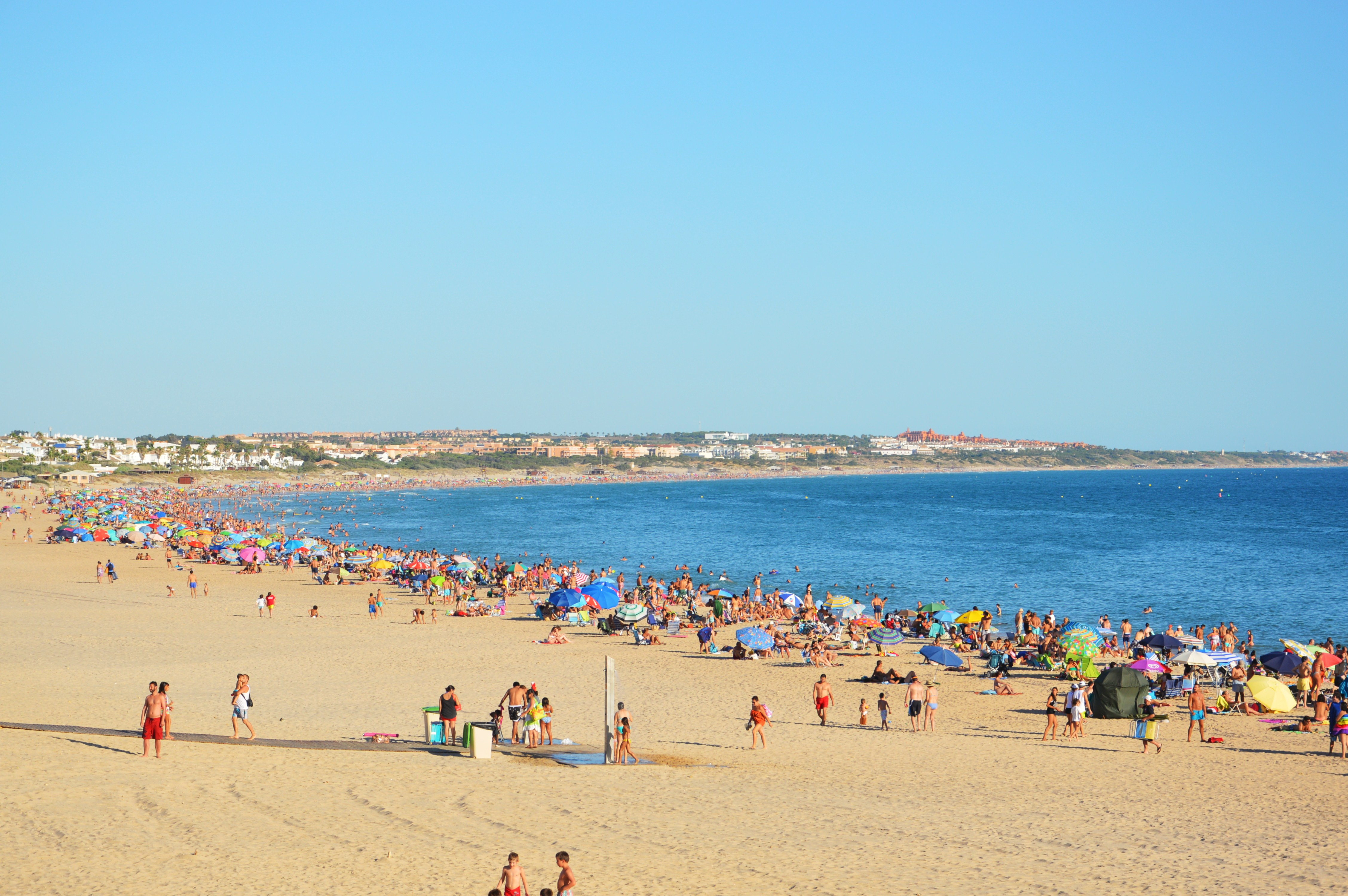 Vista panorámica de la Playa de La Barrosa en Chiclana de la Frontera, Cádiz, Andalucía, España, en 2013